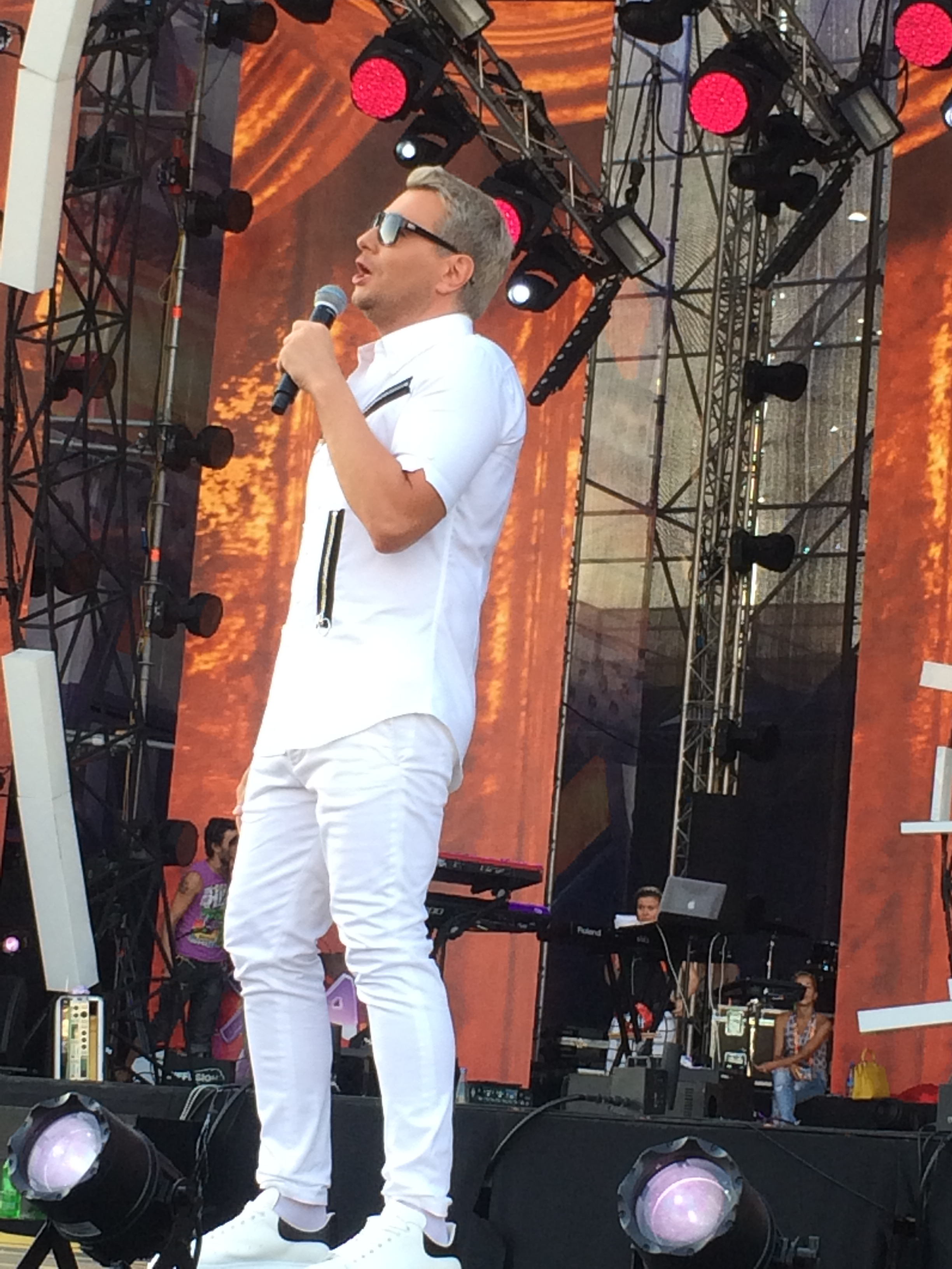 Nikolay Baskov in JARA17 repetition